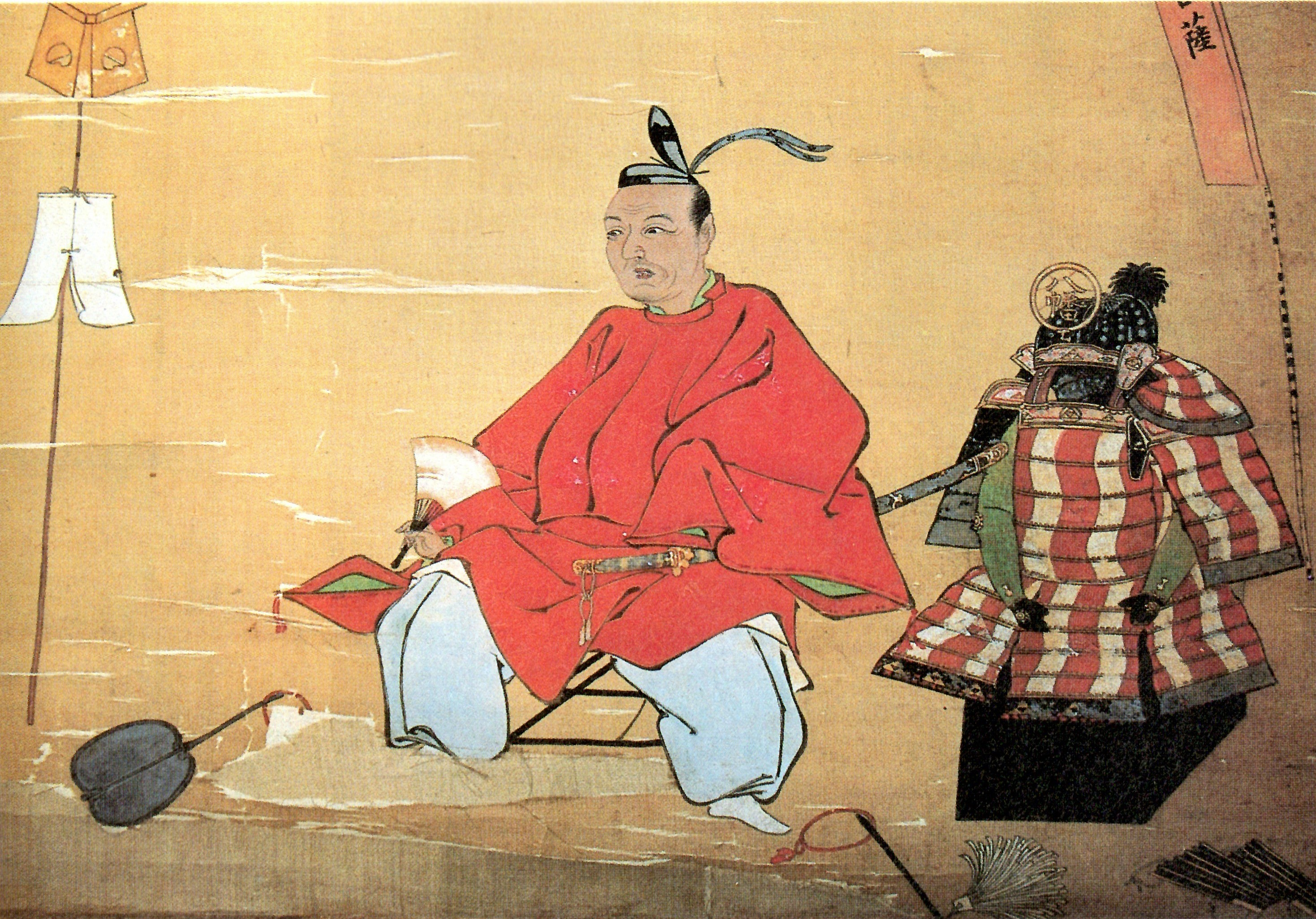 北条氏重の肖像。